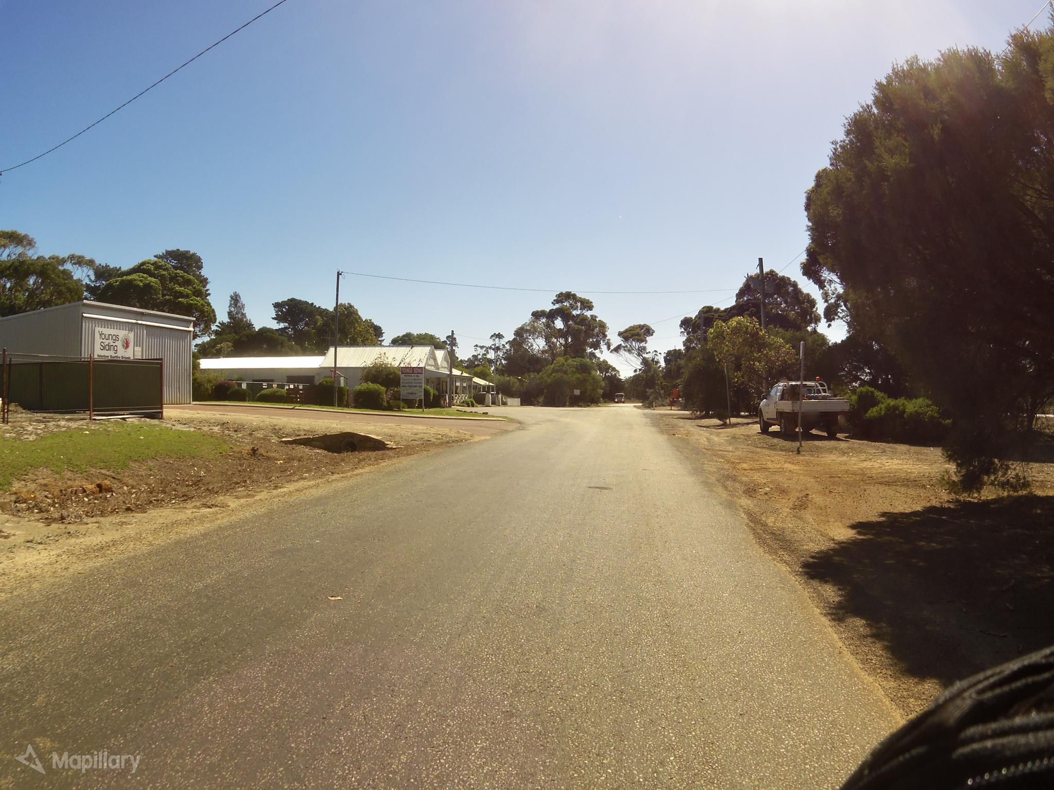 Young Siding WA